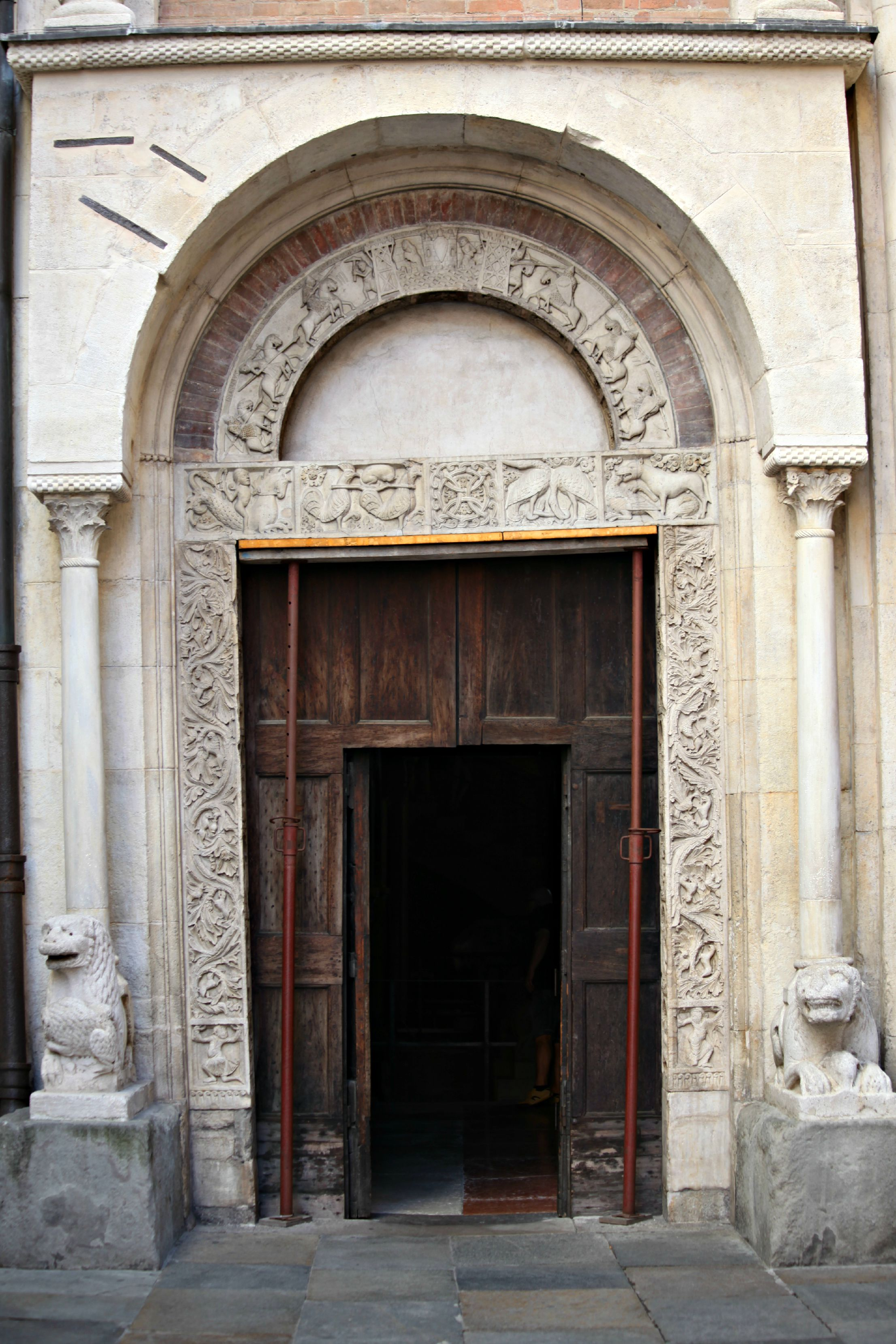 Duomo (solo esterni) This is a photo of a monument which is part of cultural heritage of Italy.